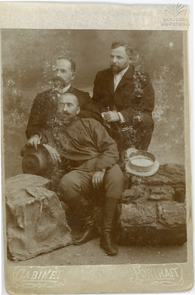 მარცხნიდან: ნიკოფორე მამინაიშვილი, თელავის გიმნაზიის დირექტორი; ლევან ვახვახიშვილი თელავის მაზრის ერობის თავმჯდომარე; ზის: ილია ვახვახიშვილი